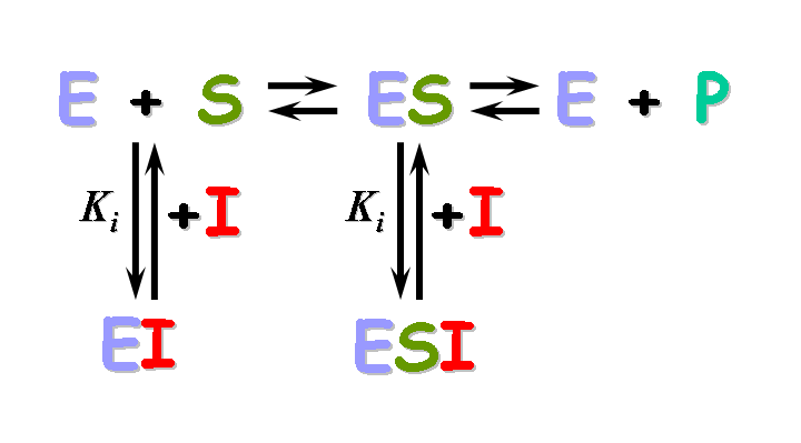 Esquema de una reacción enzimática en presencia de un inhibidor.